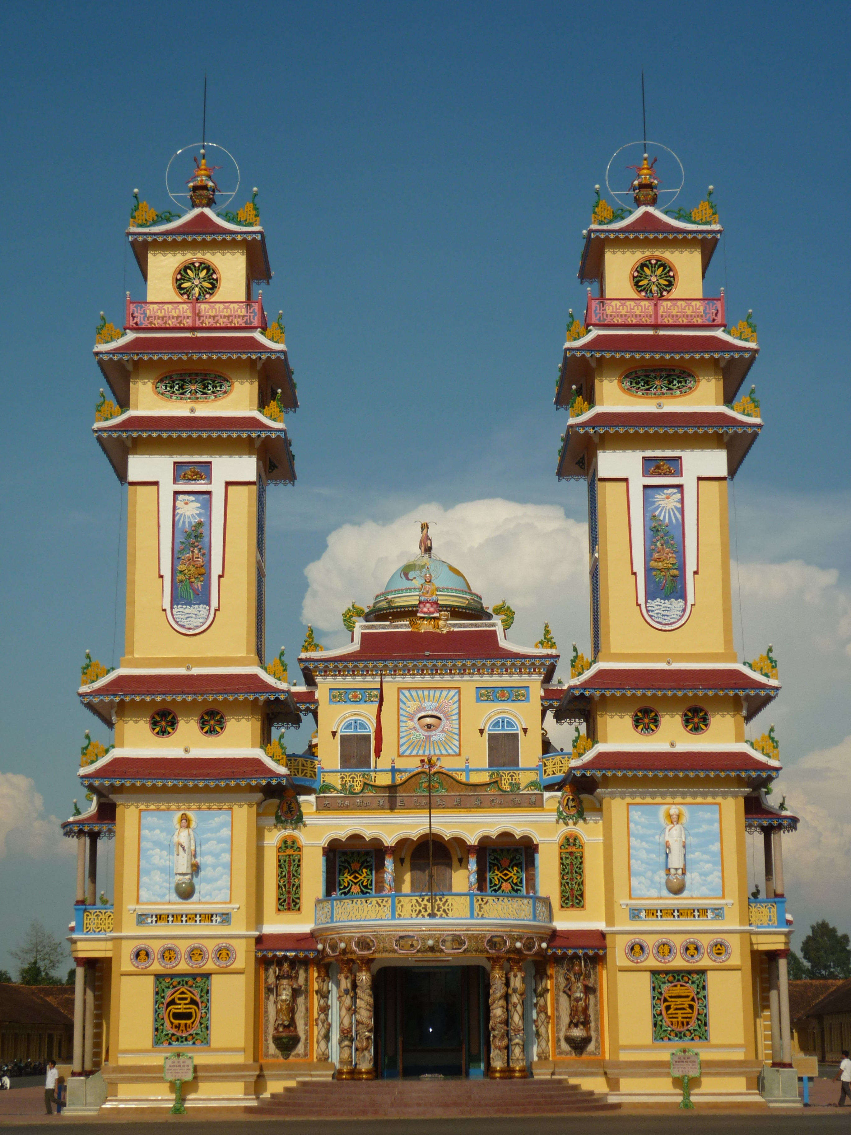 Mặt tiền Tòa Thánh Tây Ninh - hướng chính tây